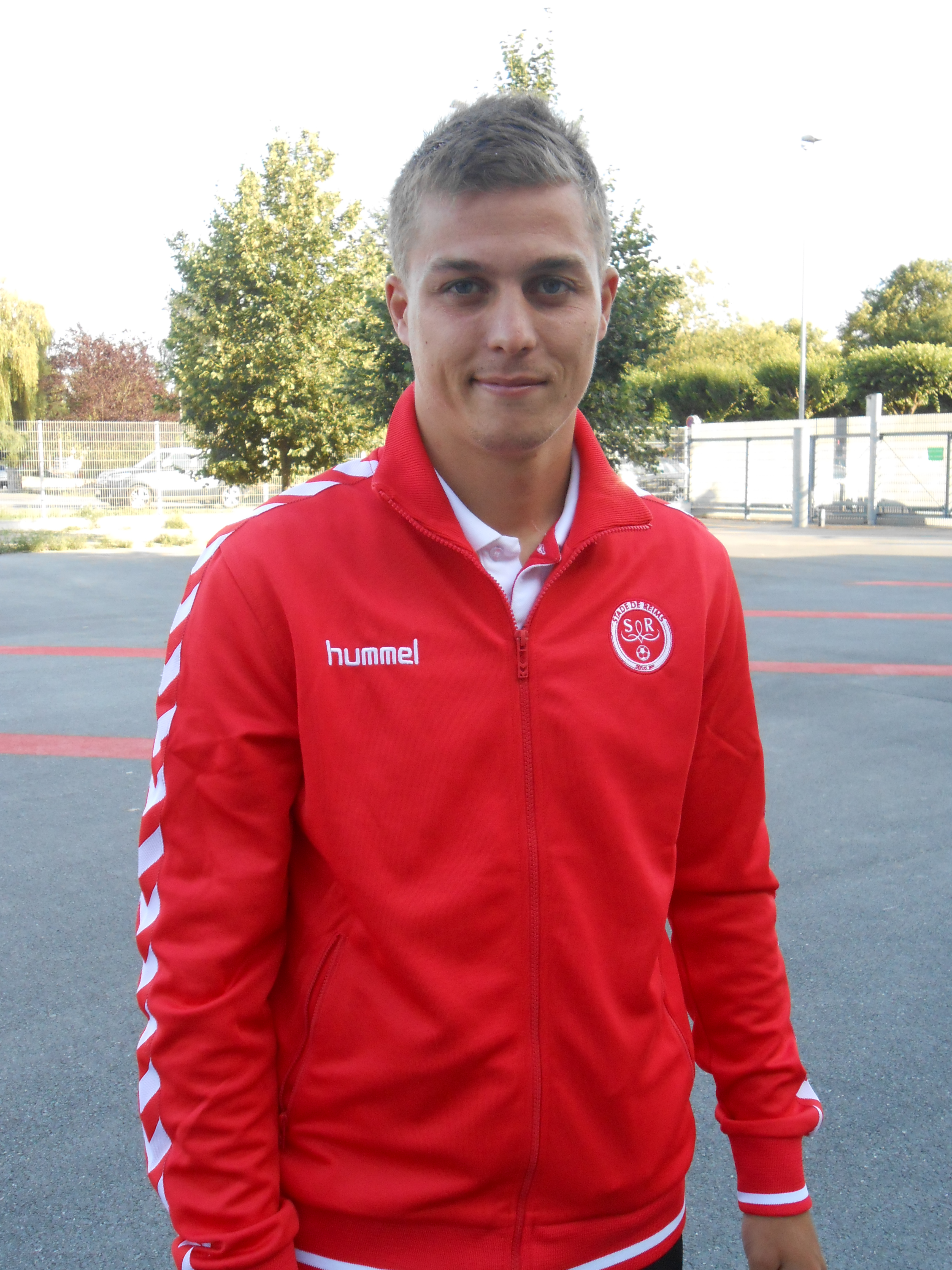 Nicolas de Préville lors de la journée des abonnés à Reims en 2015.